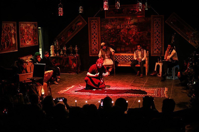 شاهنامه‌خوانی و نقالی در قزوین